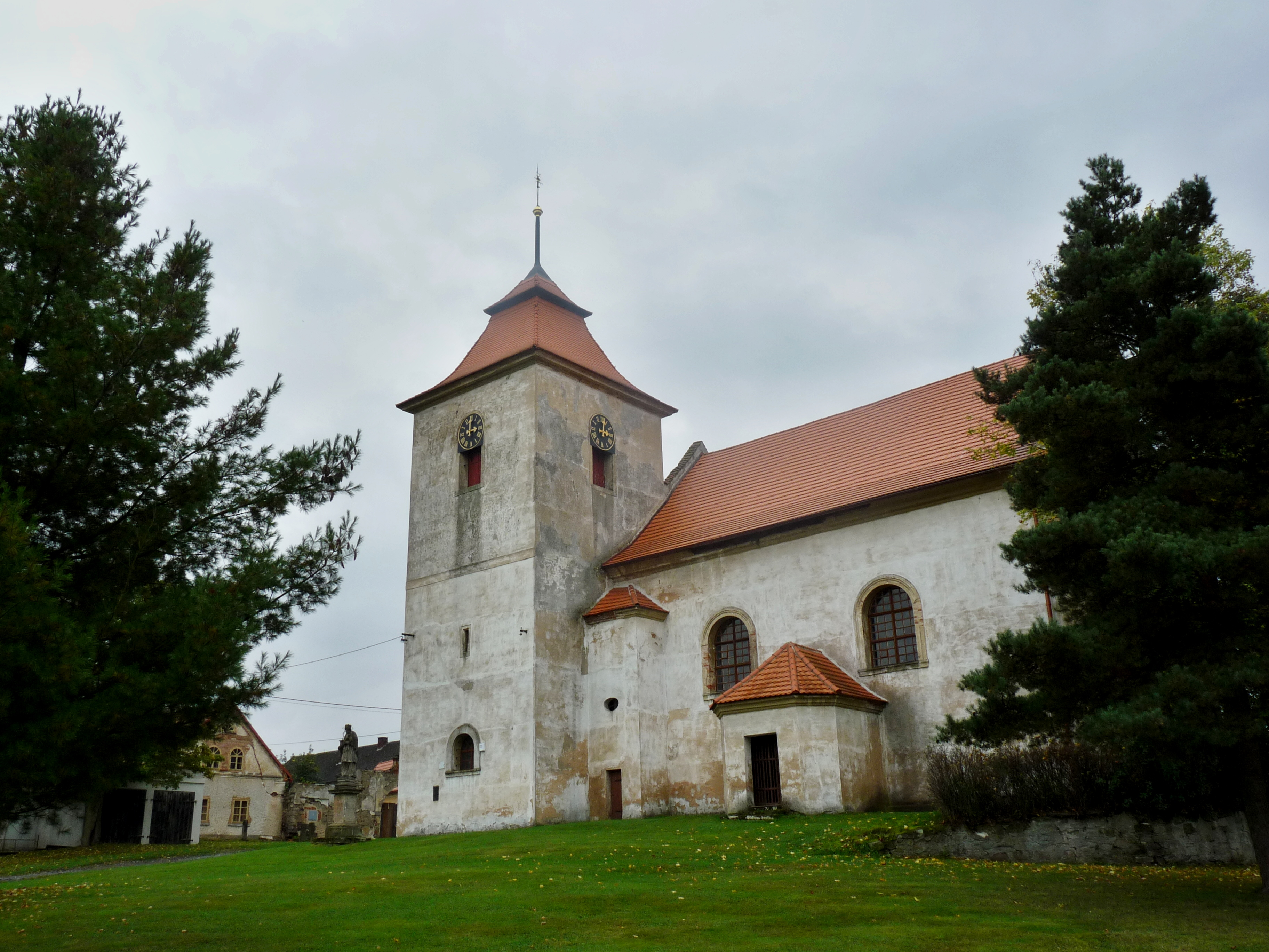 Kostel svatého Vavřince, Krsy.